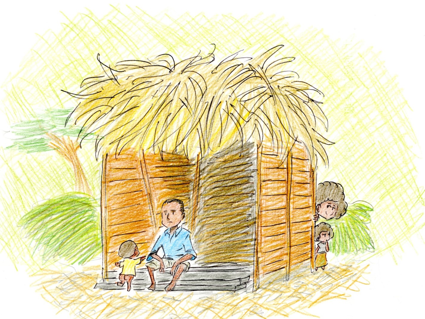 中文（中国大陆）: 塞芒人用竹葉、樹枝建造的傳統住屋